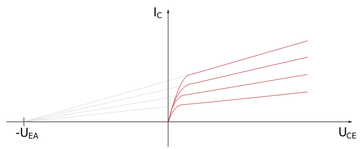 Résumé Graphique représentant l'effet early.